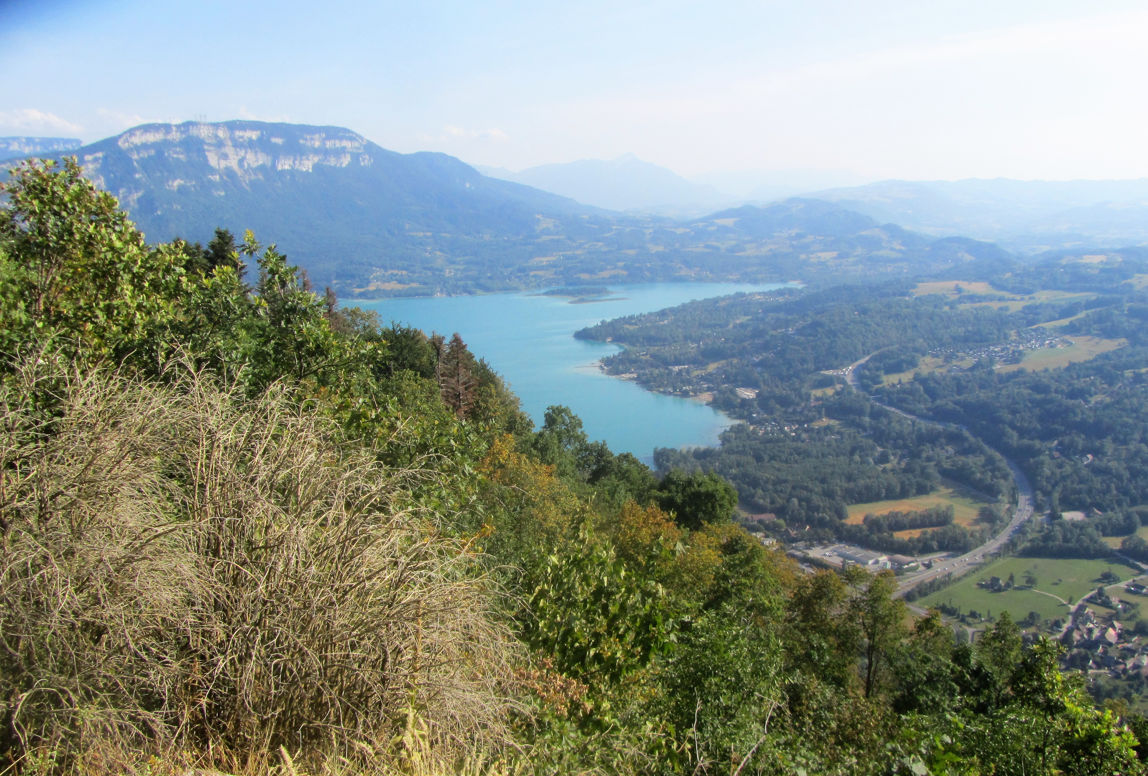 Ce relief est typiquement jurassien. De gauche à droite se succèdent l'anticlinal (ici mont Grelle), le synclinal de Novalaise et l'anticlinal du mont Tournier (ici sur la commune de Saint-Franc)